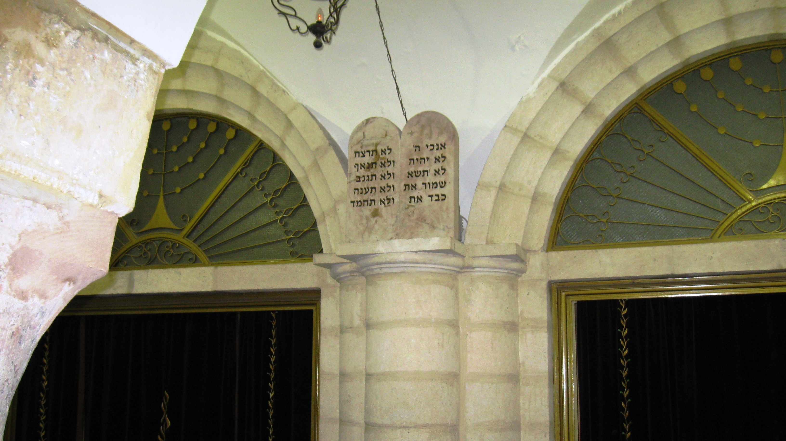 ביקור בבית הכנסת הרמבן 2014